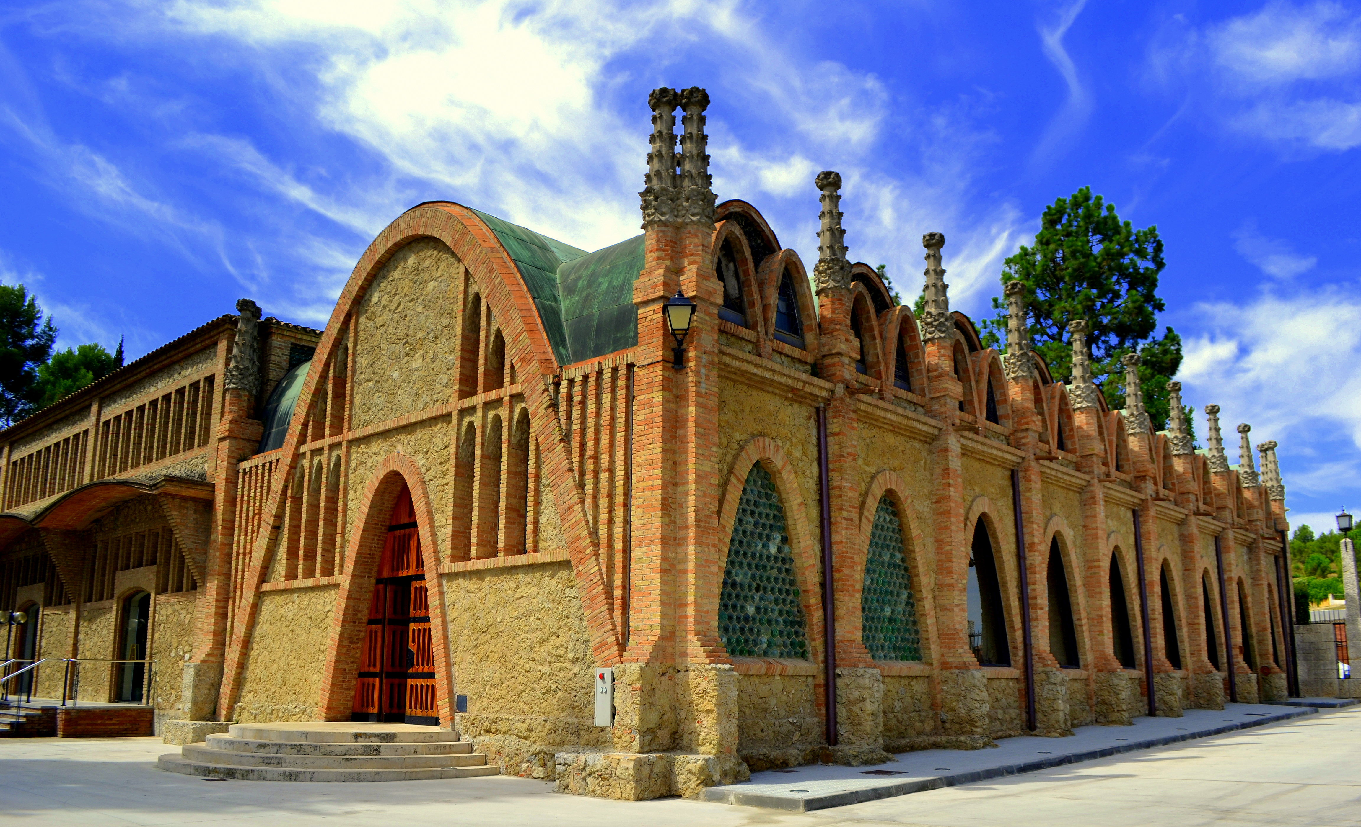 Caves Codorniu (Sant Sadurní d'Anoia)